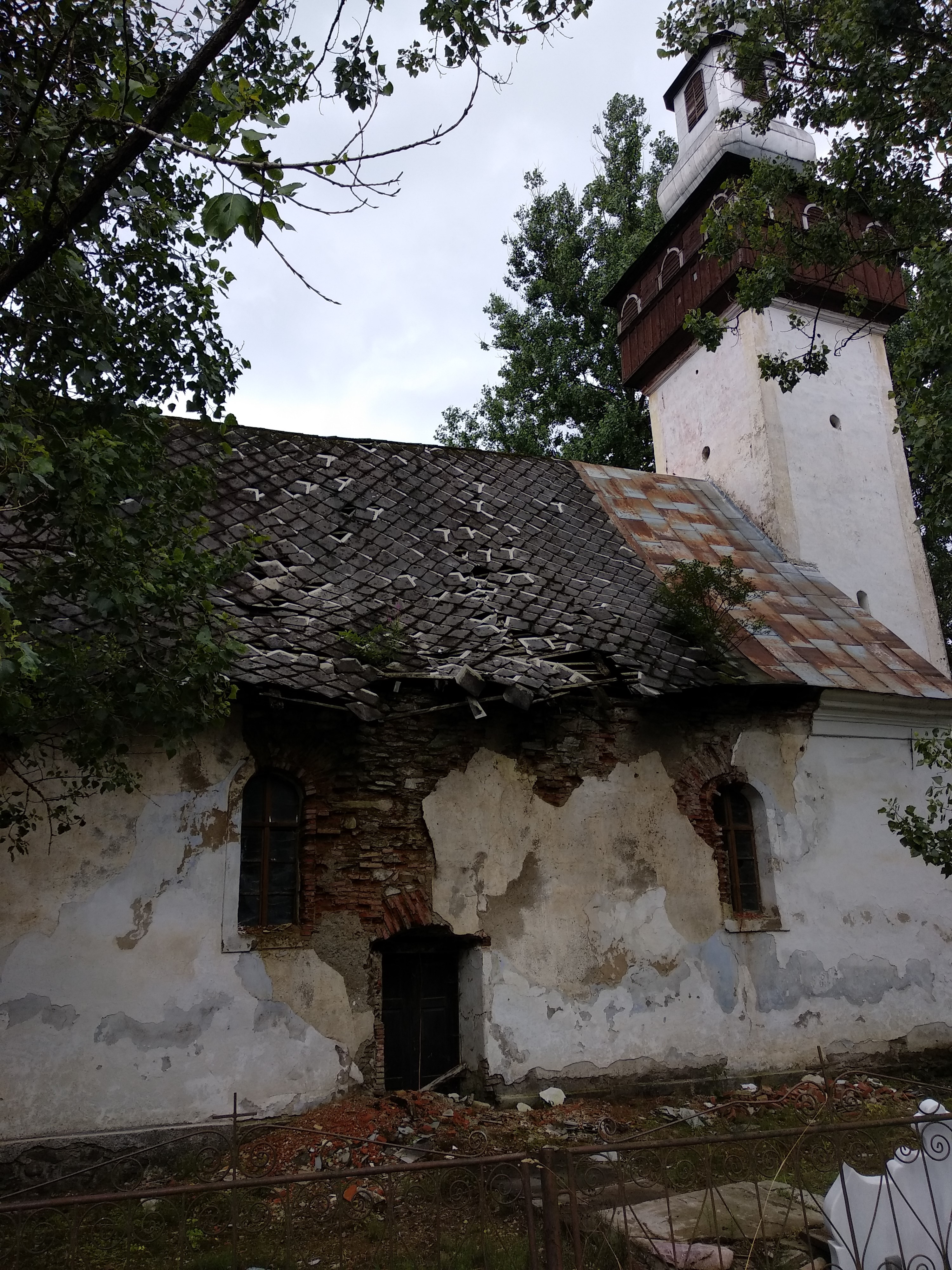 Vechea Biserica din Horea ,jud.Alba , construita in 1842 , un lacas istoric lasat de izbeliste . Ar putea reprezenta un punct de atractie turistica ,dar si de educatie patriotica pentru vizitatori.